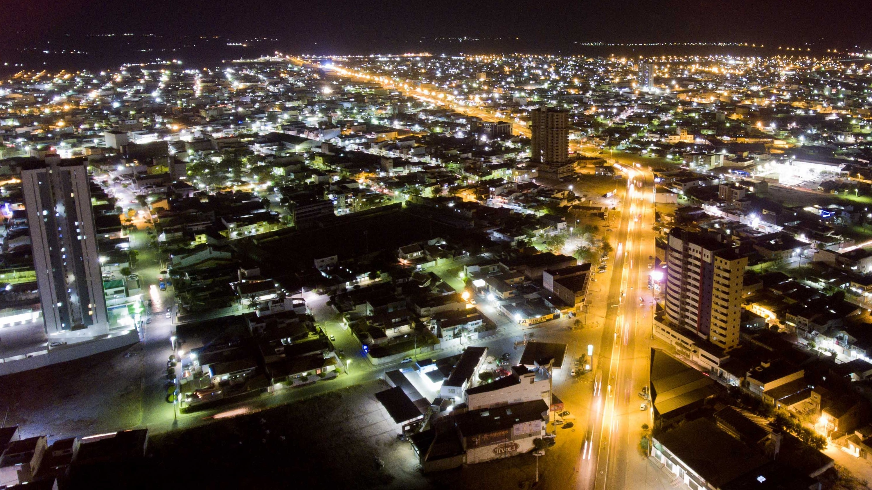 Vista da Avenida Prefeito Brás de Lira a Noite